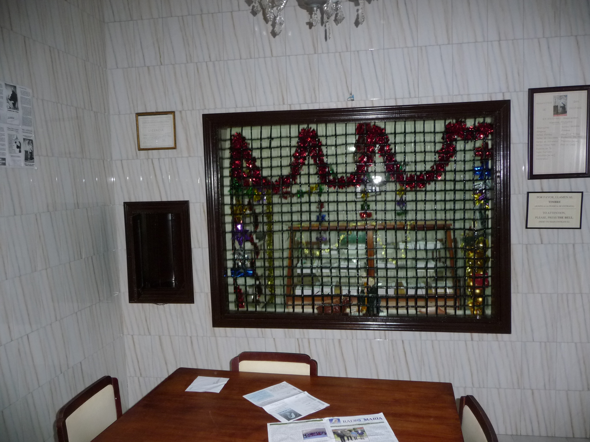 MedinaSidonia-P1060060.JPG